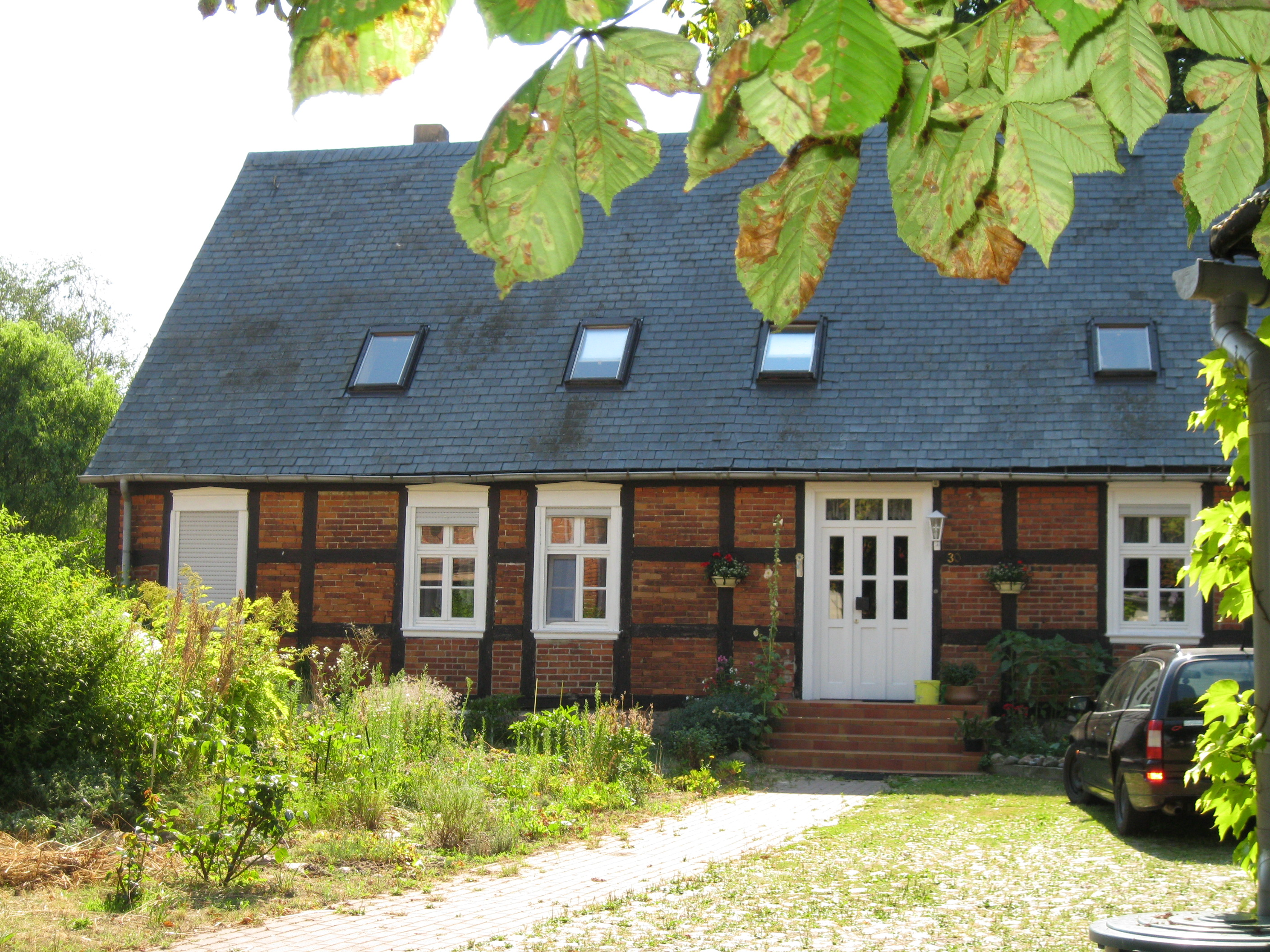 Geburtshaus von Jürgen Eggebrecht; ehemaliges Pfarrhaus in Baben